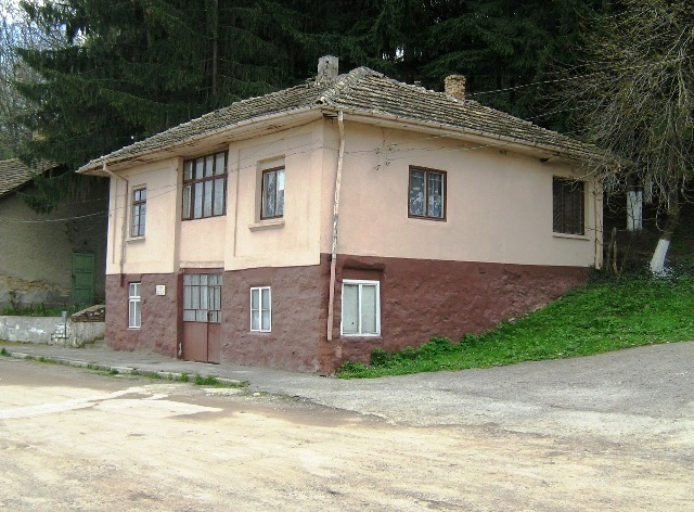 Сградата на Народното читалище на село Долна Кабда - бившето селско кметство от преди 1944 год., в която е убит партизанският ятак - Тилки. Фото: Вл. Стойков - април 2008 год.